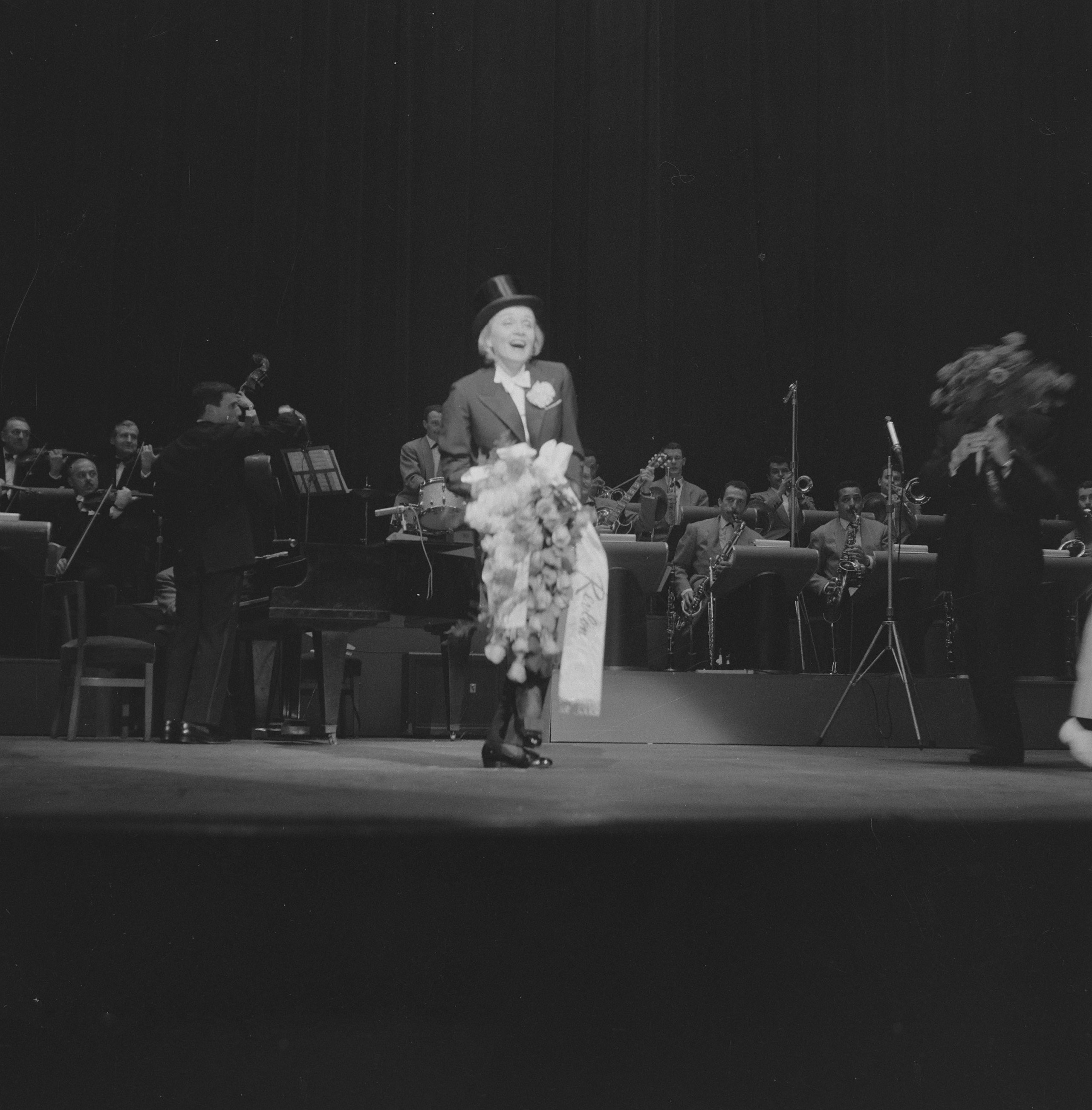 Collectie / Archief : Fotocollectie Anefo Reportage / Serie : [ onbekend ] Beschrijving : Nachtoptreden van Marlene Dietrich in het Tuschinkitheater te Amsterdam. Marlene dankt met bloemen voor het applaus Datum : 28 mei 1960 Locatie : Amsterdam, Noord-Holland Trefwoorden : actrices, filmsterren, theater, voorstellingen, zangeressen Persoonsnaam : Dietrich Marlene Fotograaf : Lindeboom, Henk / Anefo Auteursrechthebbende : Nationaal Archief Materiaalsoort : Negatief (zwart/wit) Nummer archiefinventaris : bekijk toegang 2.24.01.03 Bestanddeelnummer : 911-2854